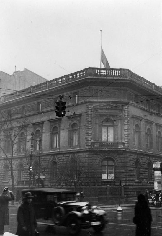 Berlin, sächsische Gesandschaft Scherl: Anlässlich der Beisetzung des Königs v. Sachsen hat die sächsische Gesandtschaft in der Voss-Str. halbmast geflaggt. 5629-32 ADN-ZB-Archiv Berlin 1932 Auf der sächsischen Gesandschaft in der Voßstraße wurde anläßlich der Beisetzung des am 18. Februar 1932 versorbenen Exkönigs von Sachsen August III. (geb. 255.1865) die Flagge auf Halbmast gesetzt. 5629-32